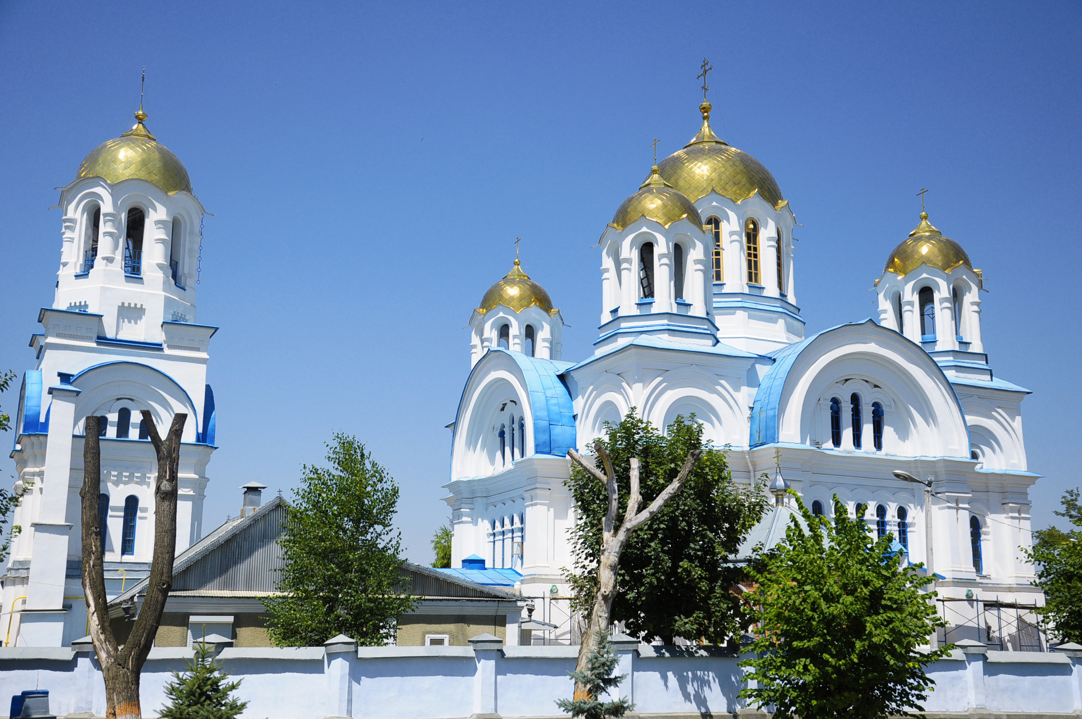 Никольский собор (город Прохладный, Кабардино-Балкария, Российская Федерация)